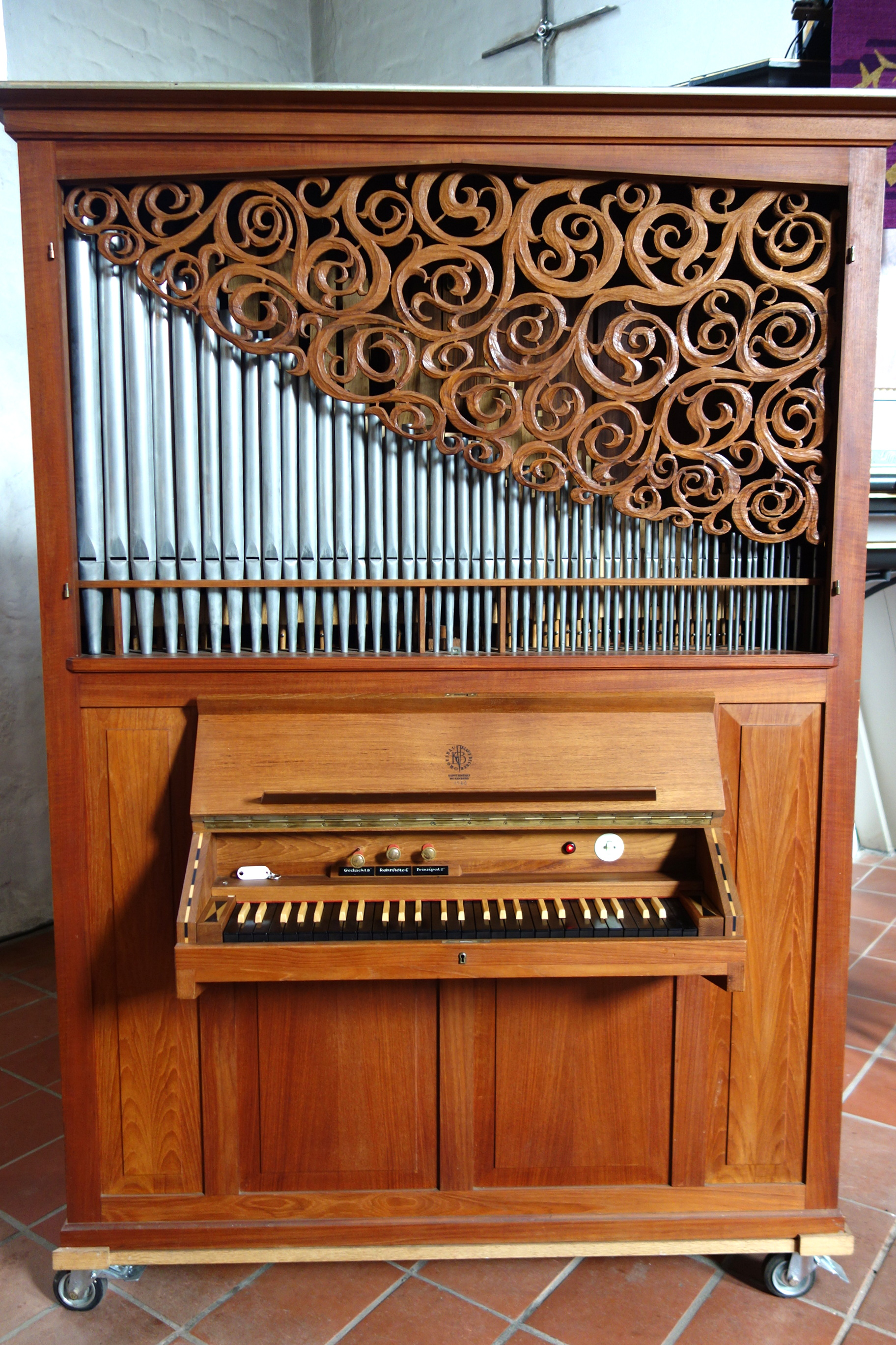 Orgel von St. Georg auf dem Berge, Ratzeburg, Schleswig-Holstein, Deutschland